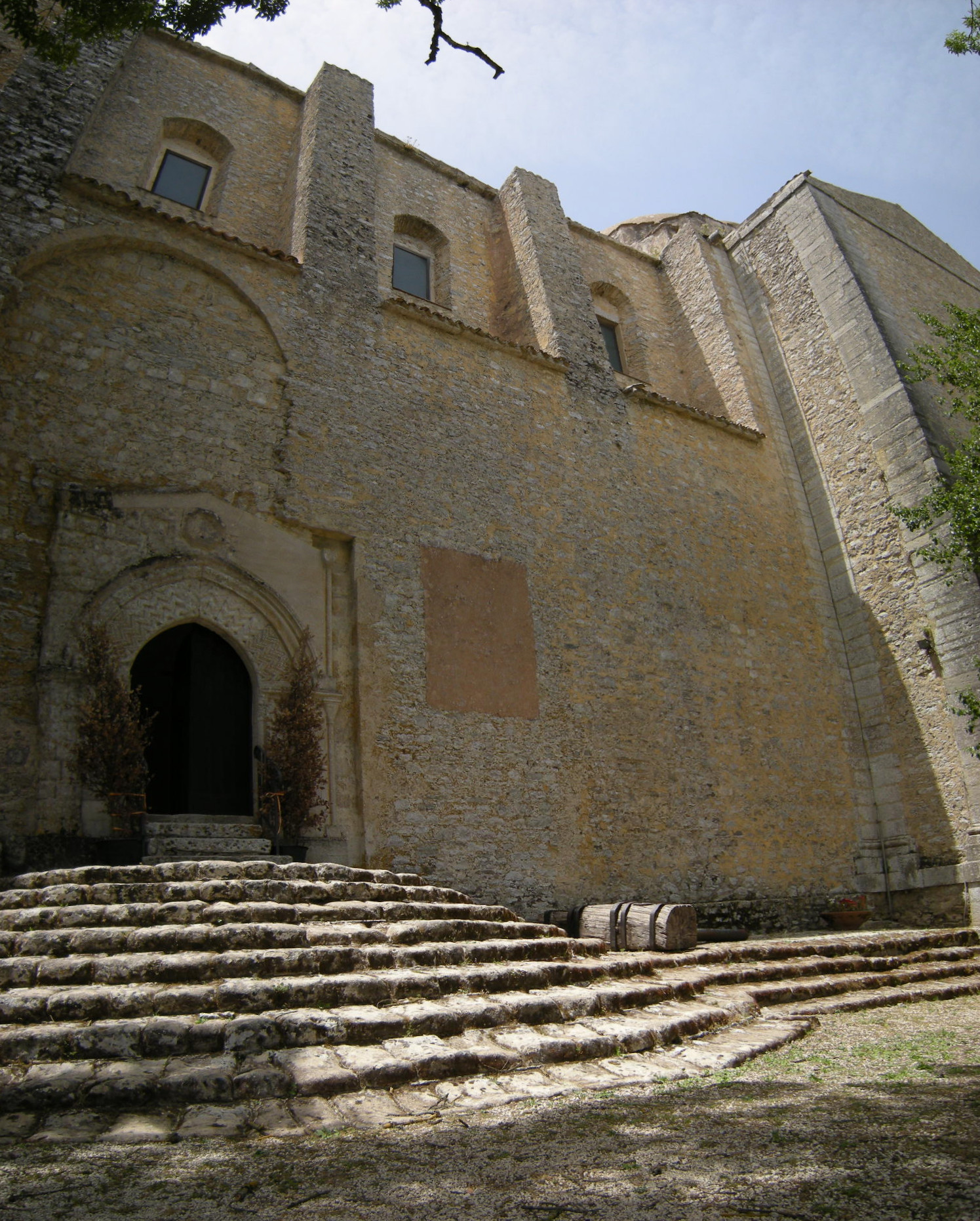 Construída por volta de 400 d.C. e ampliada em 1631